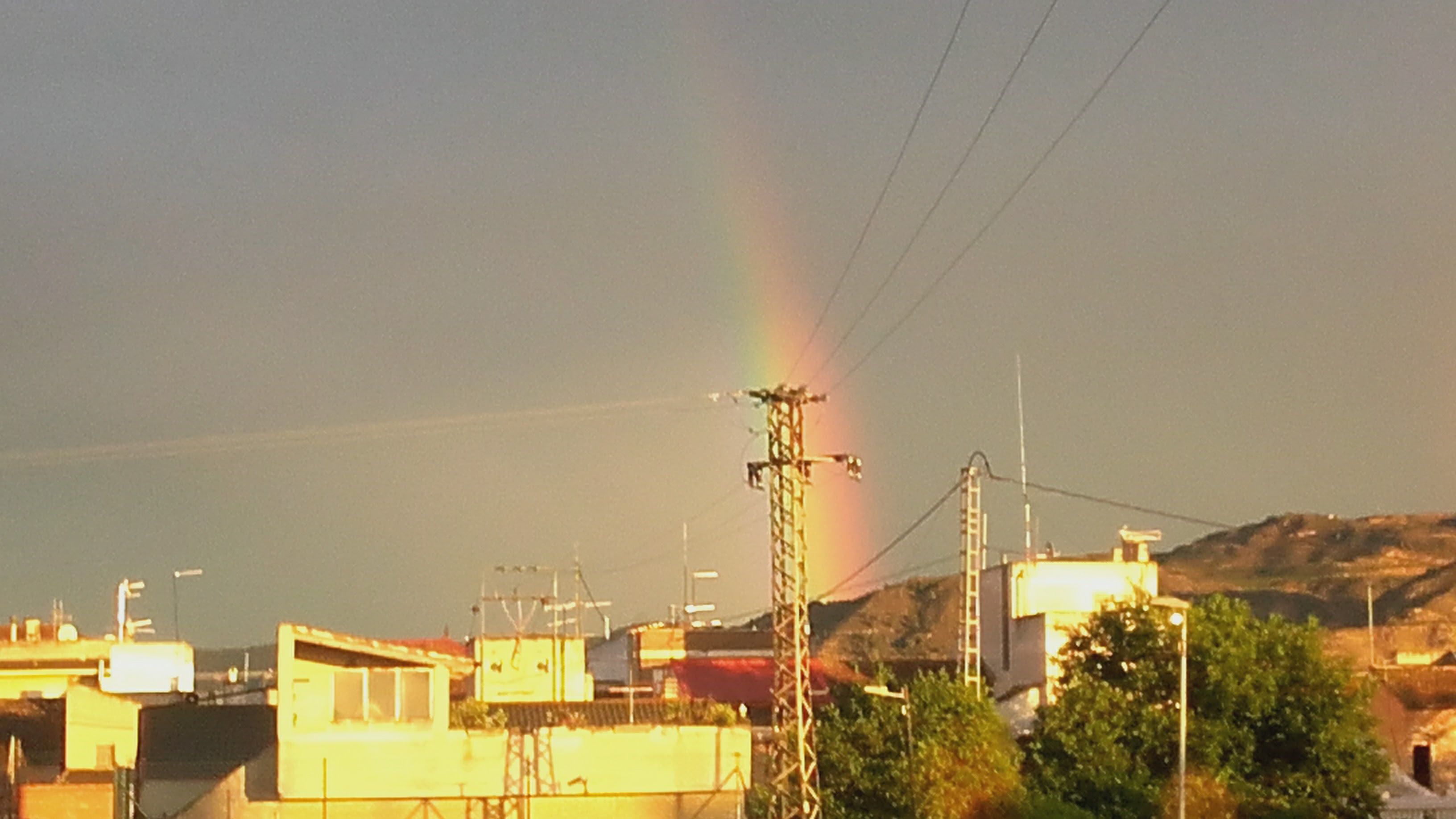 Vista de Alquerías, desde el río Segura, en una tarde con un arcoírís de fondo.